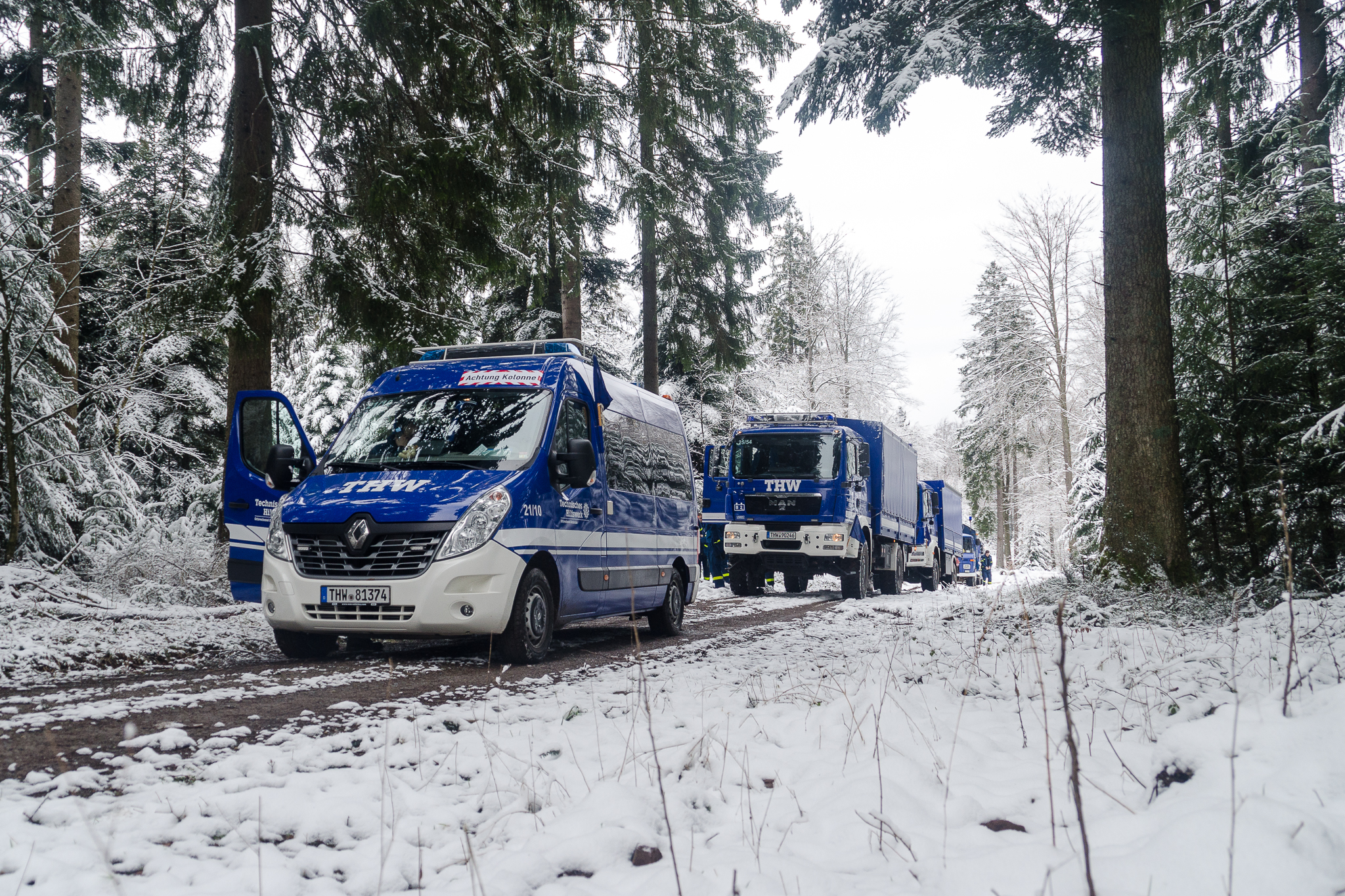 Kolonne des THW Karlsruhe im Nordschwarzwald